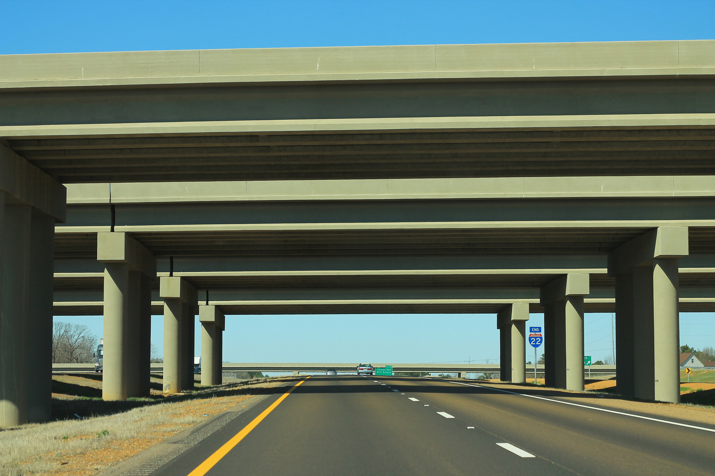 I-22 End Sign at I-269